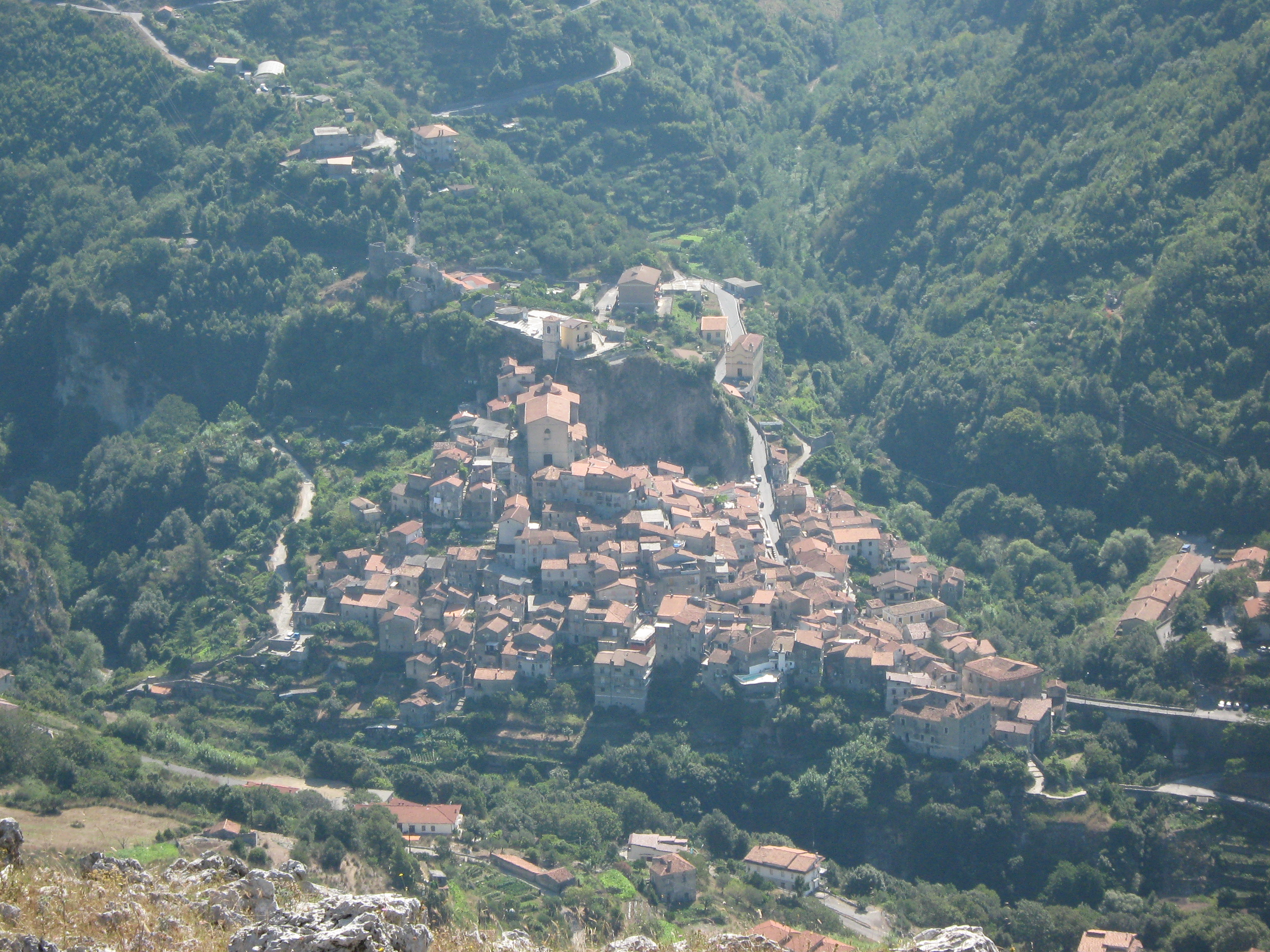 Papasidero da Monte Sant'Angelo